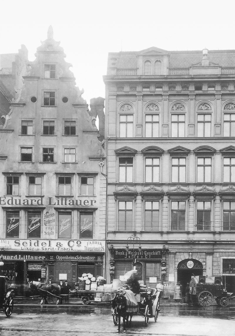 Kamienica nr 27 na wrocławskim Rynku (z lewej), lata 1907-1908